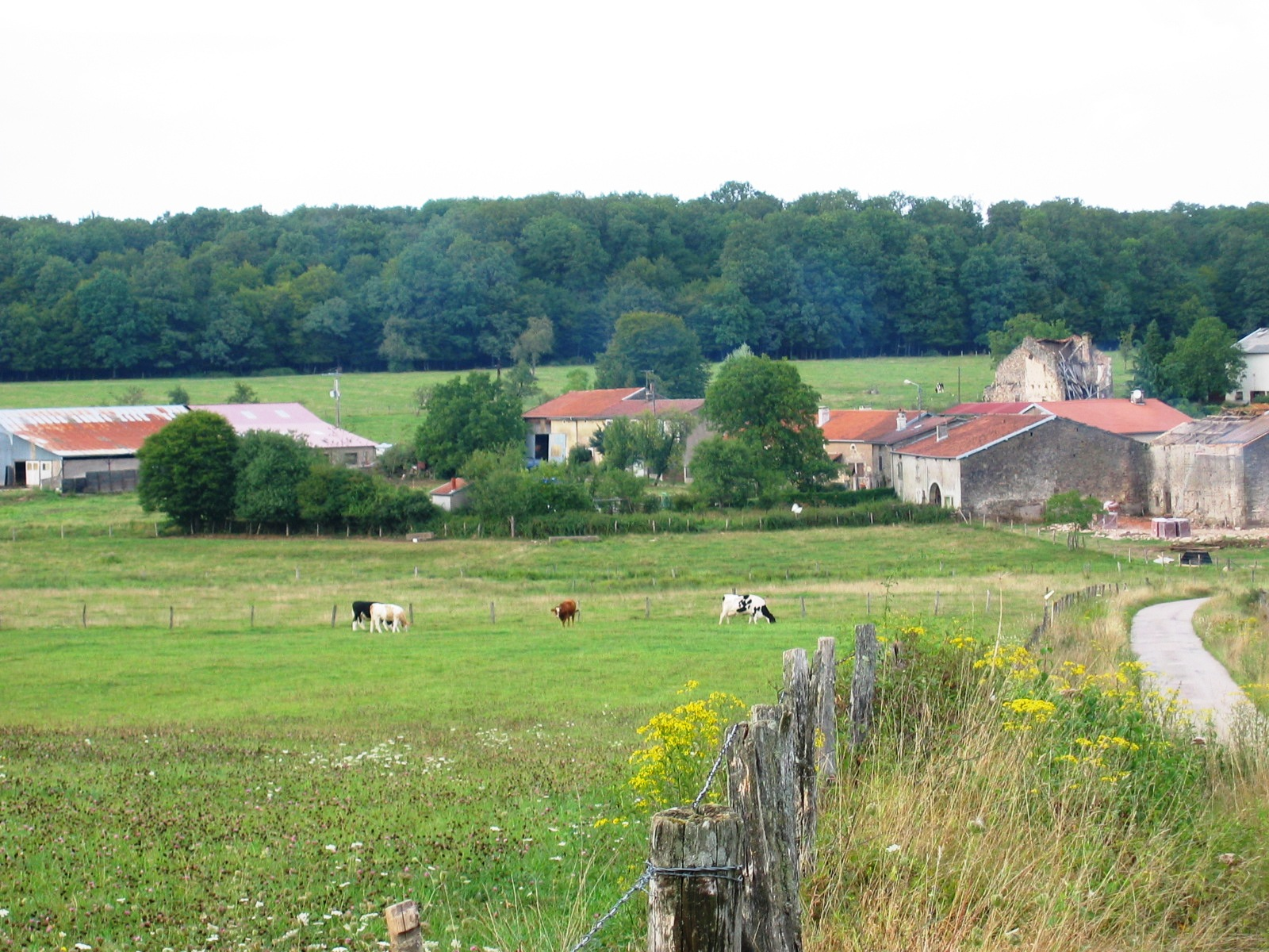 Claudon Hameau de la Grande Catherine